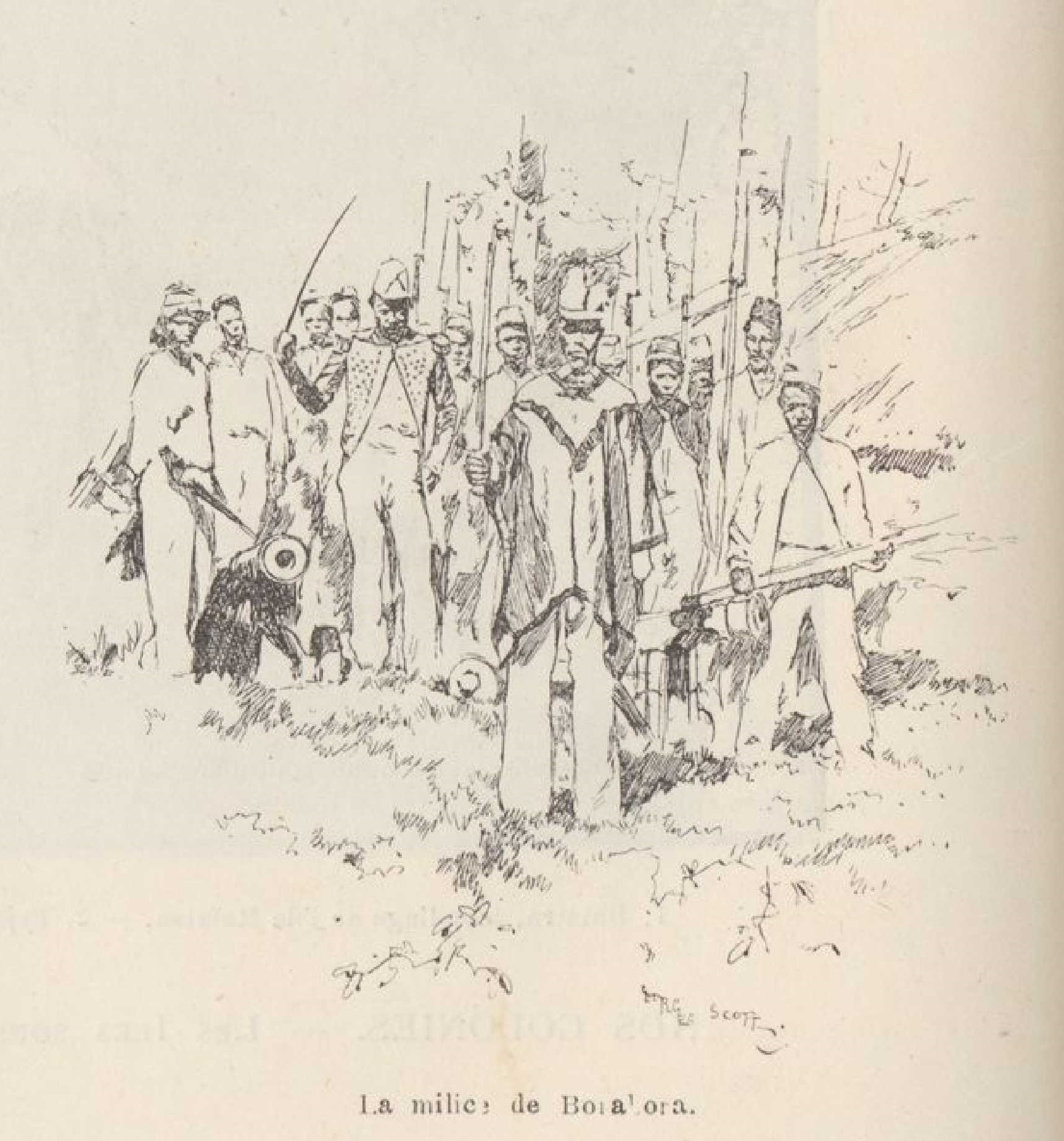 La milice, de Borabora.